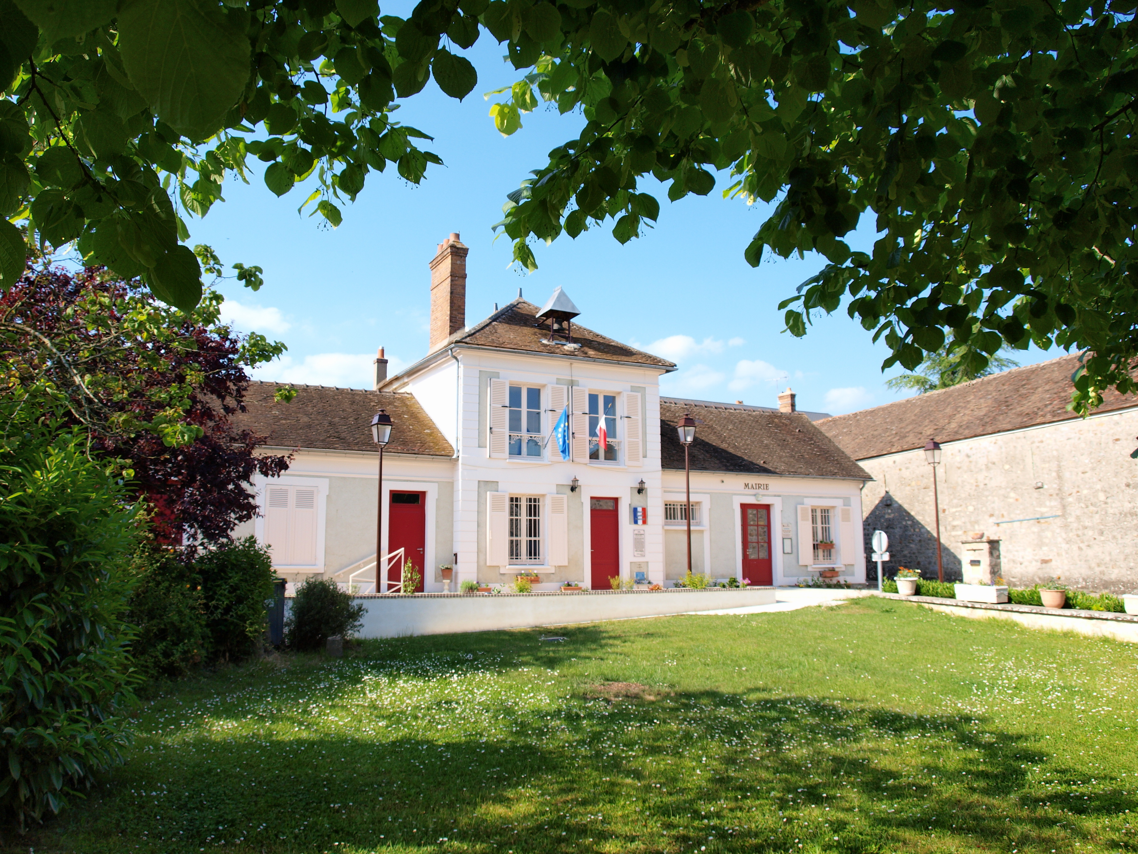 Montmachoux (Seine-et-Marne, France)